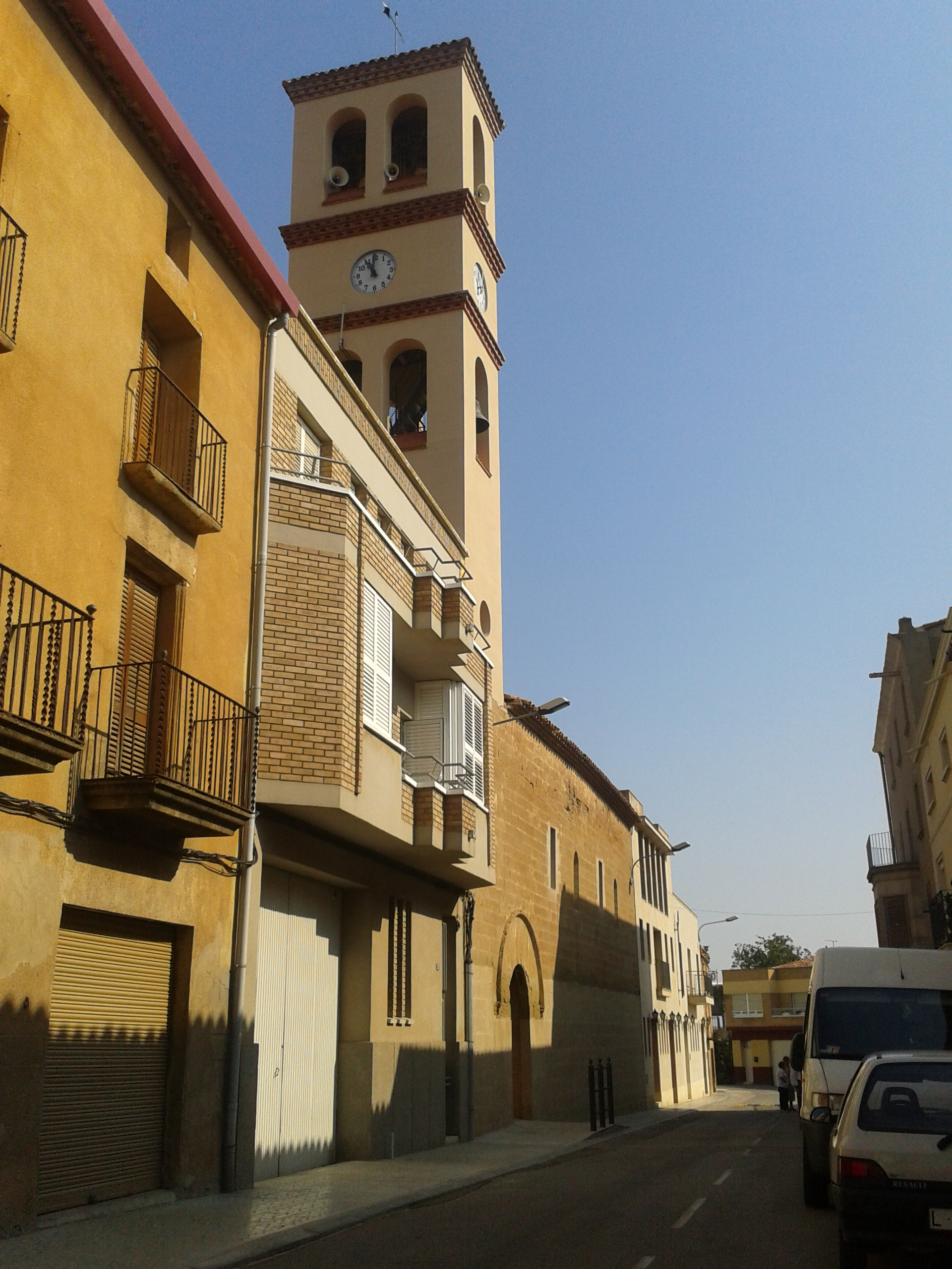 Església parroquial de l'Assumpció (Torre-serona)